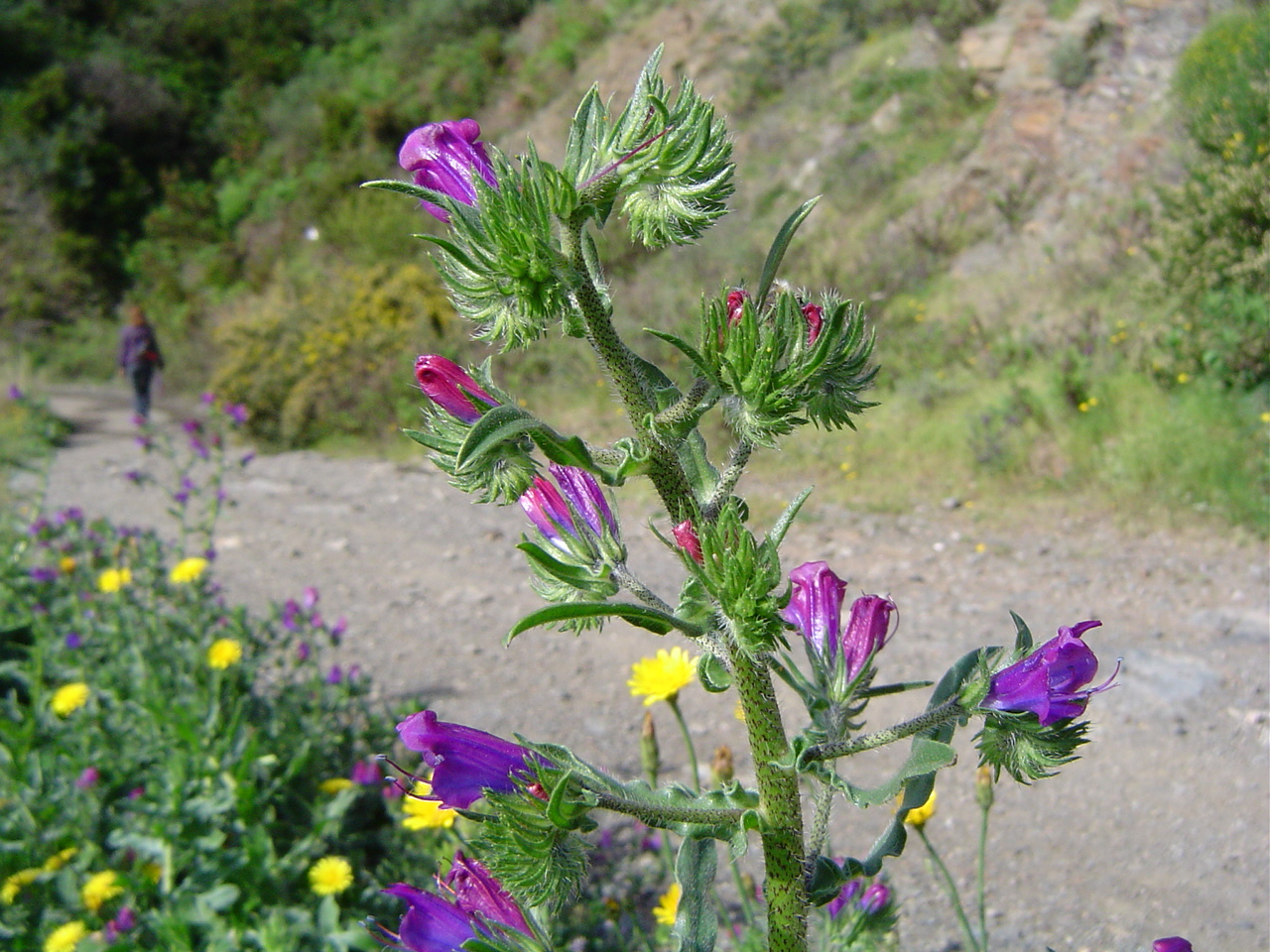 Echium creticum, Ceuta, España